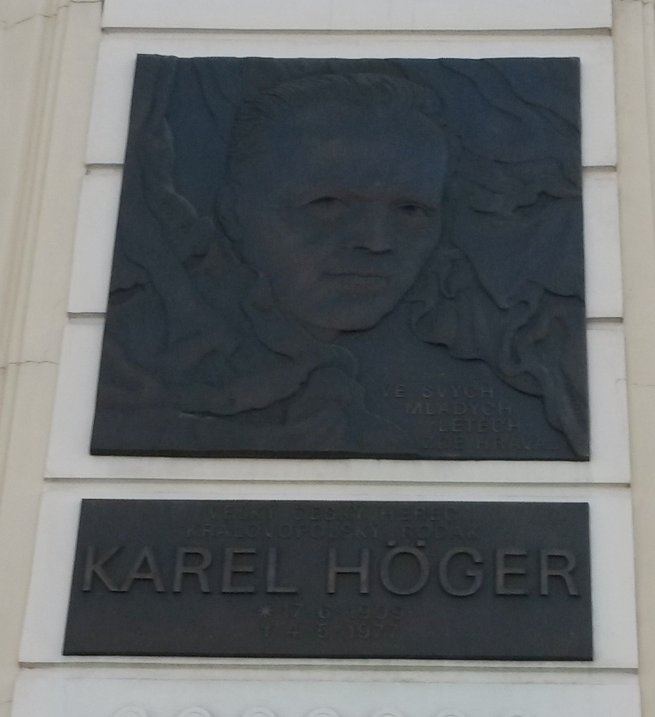 pamětní deska Karla Högera na budově brněnského Semilassa